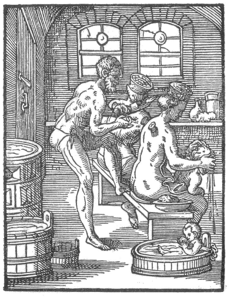 Der Bader Holzschnitt aus: Jost Amman (1539-1591): Eygentliche Beschreibung aller Stände auff Erden hoher und nidriger, geistlicher und weltlicher, aller Künsten, Handwerken und Händeln ... (erstmals Frankfurt am Main 1568; auch bekannt als: Das Ständebuch) Im Buch wird das Bild von folgendem Text von Hans Sachs begleitet: Wolher ins Bad Reich unde Arm, Das ist jetzund geheitzet warm, Mit wolschmacker Laug ma euch wescht, Denn auff die Oberbanck euch setzt, Erschwitzt, denn werdt jr zwagn und gribn, Mit Lassn das ubrig Blut außtriebn, Denn mit dem Wannenbad erfreuwt, Darnach geschorn und abgefleht. (Anmerkung: wolschmack: wohlriechend // zwagn: gewaschen // gribn: gerieben // Lassn: Aderlassen // abgefleht: von Flöhen gereinigt)